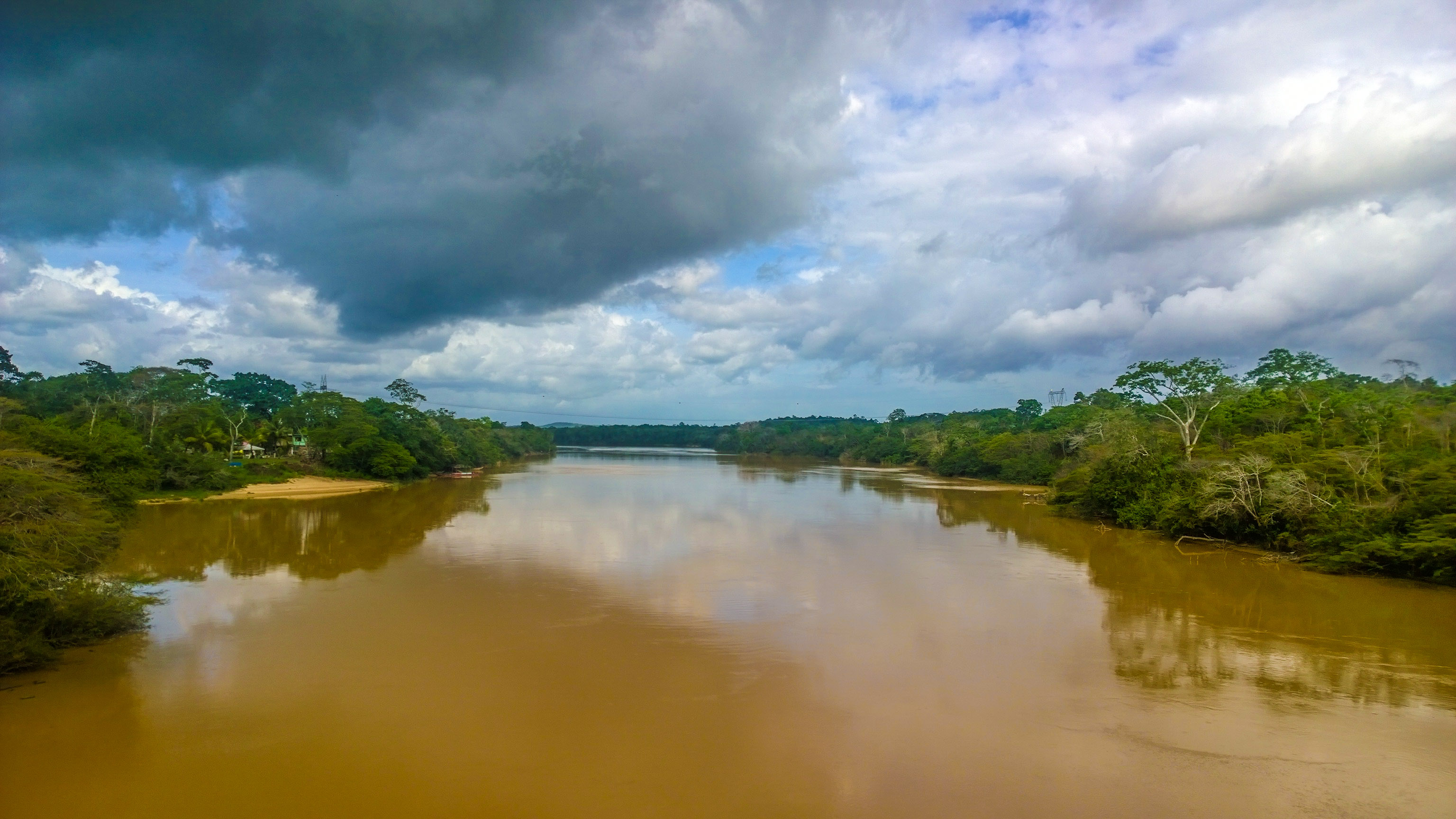 Río Cuyuni, El Dorado, Venezuela.